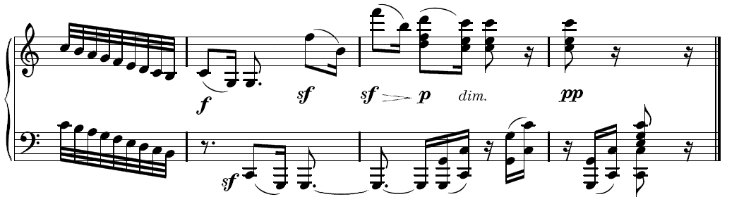 Conclusion de la Sonate pour piano nº 32, opus 111, de Ludwig van Beethoven